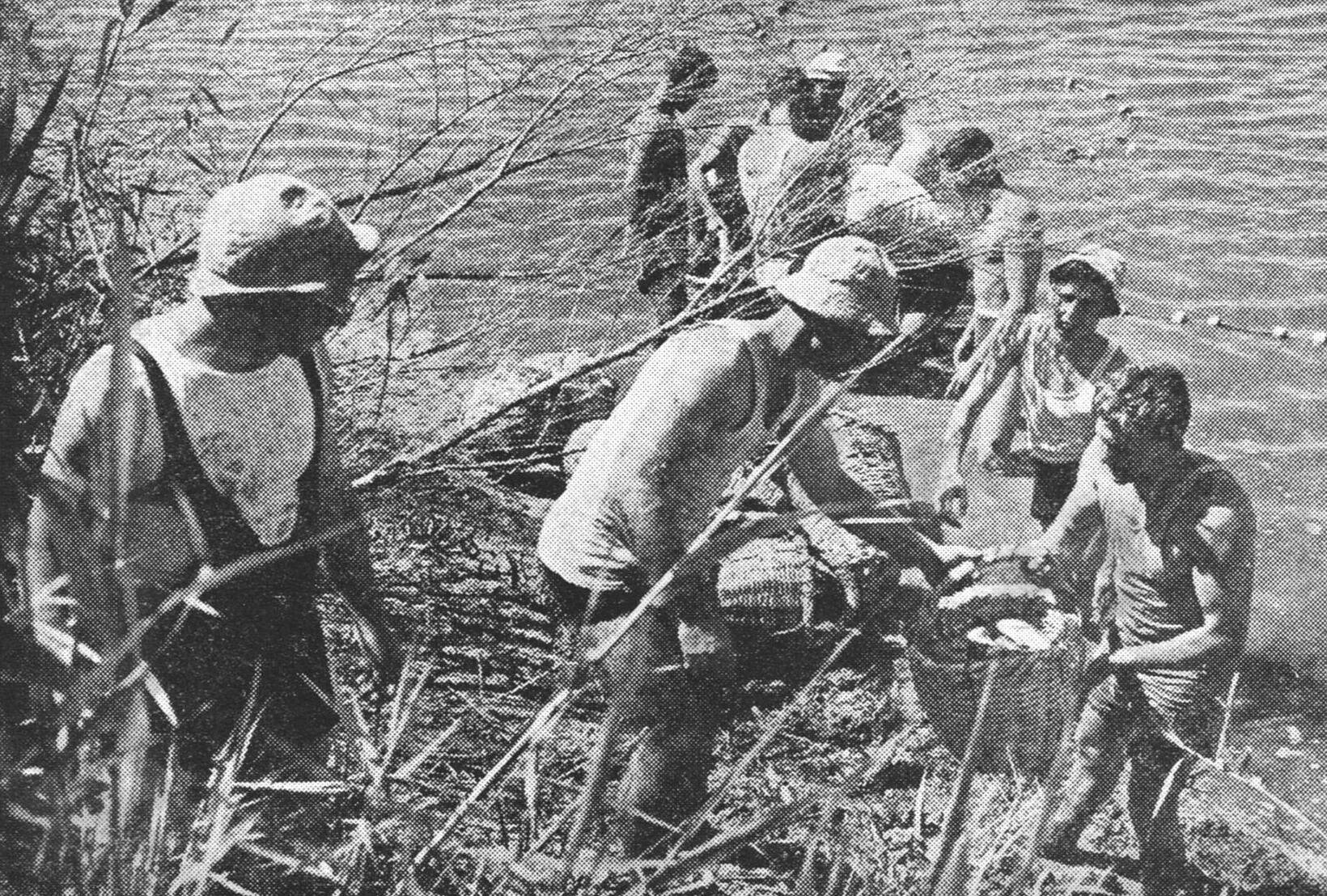 דיג בברכת דגים בבית הערבה, 1945.